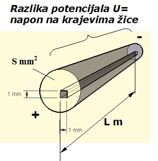 Resistance